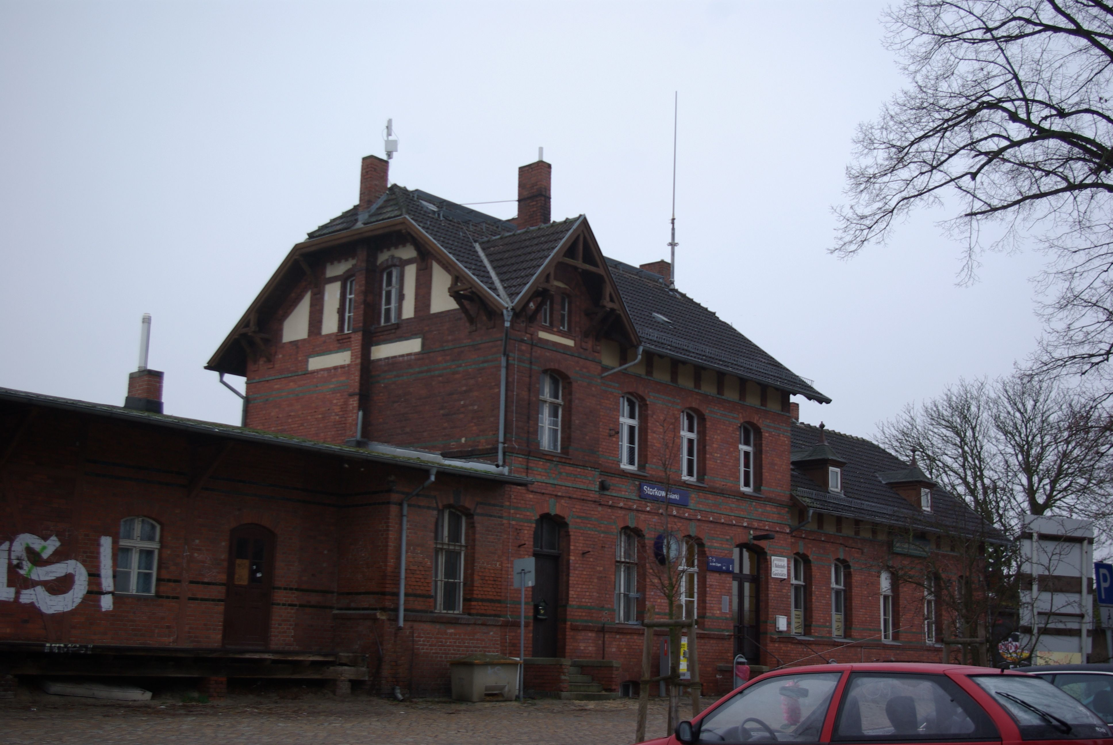 Storkow in Brandenburg. Der Bahnhof steht unter Denkmalschutz.